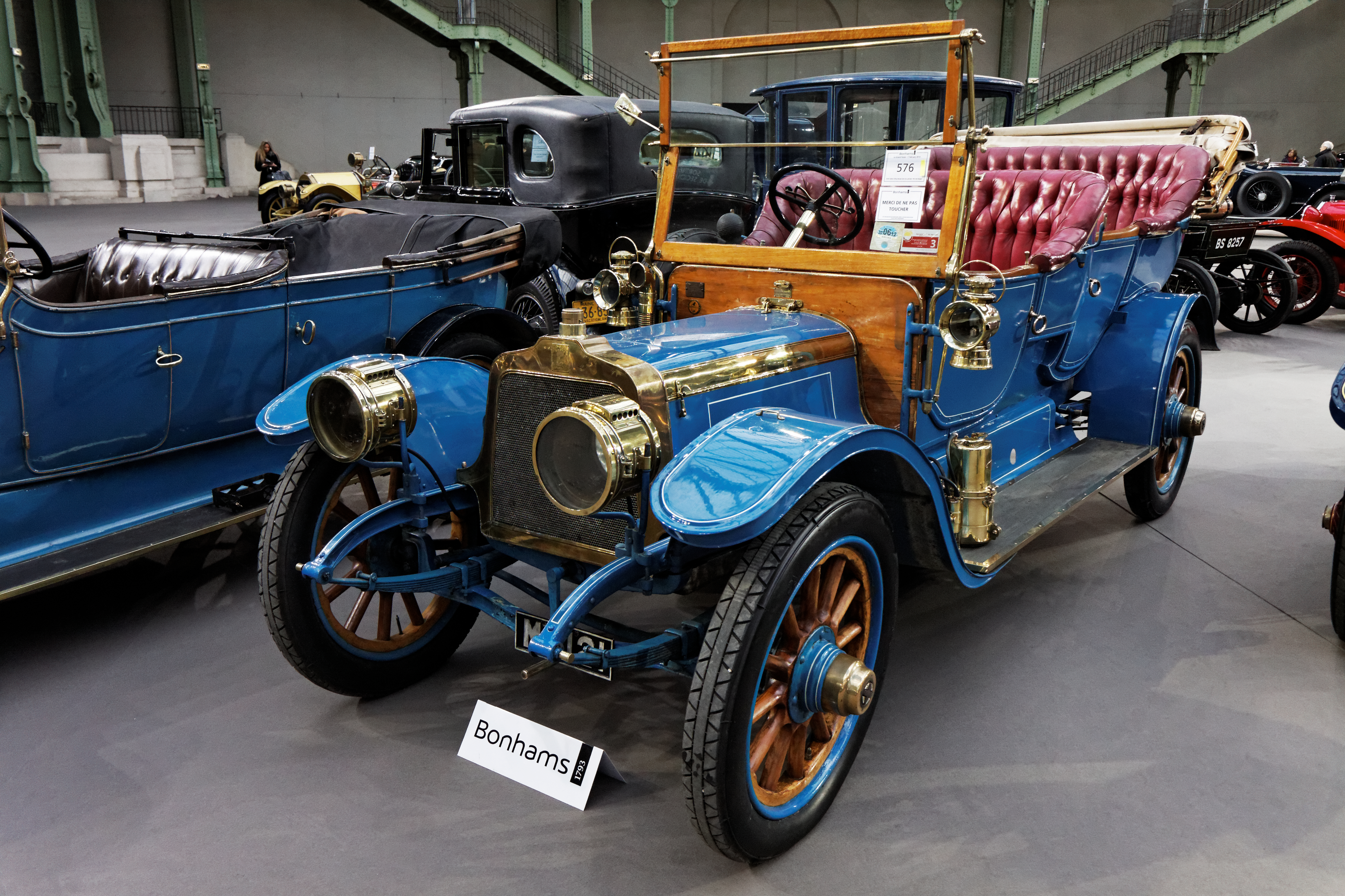 Une Talbot 25HP model 6AS six cylinder Roi des Belges tourer de 1910.